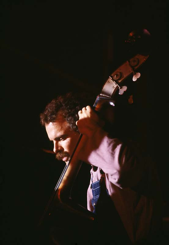 Dennis Irwin, basist i The Jazz Messengers, på Umeå jazzfestival.; Musik; Personer; Övrigt